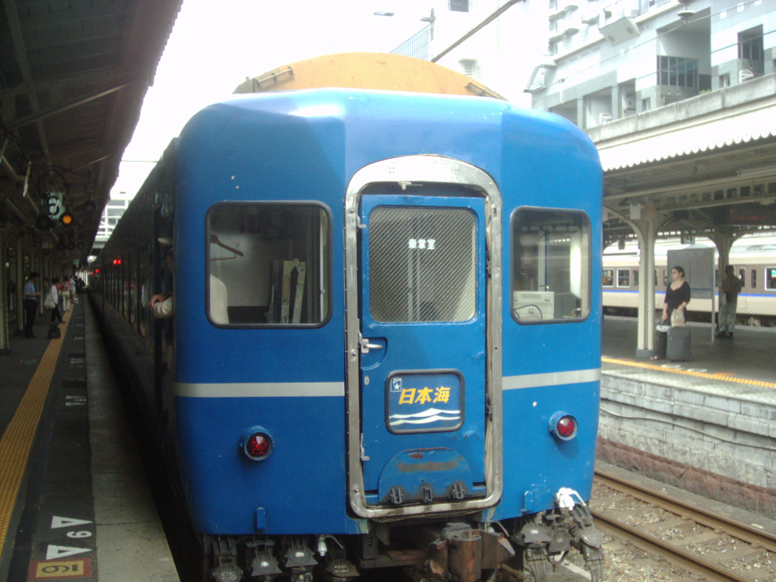 京都駅にて投稿者が撮影 2004年9月5日 (日)